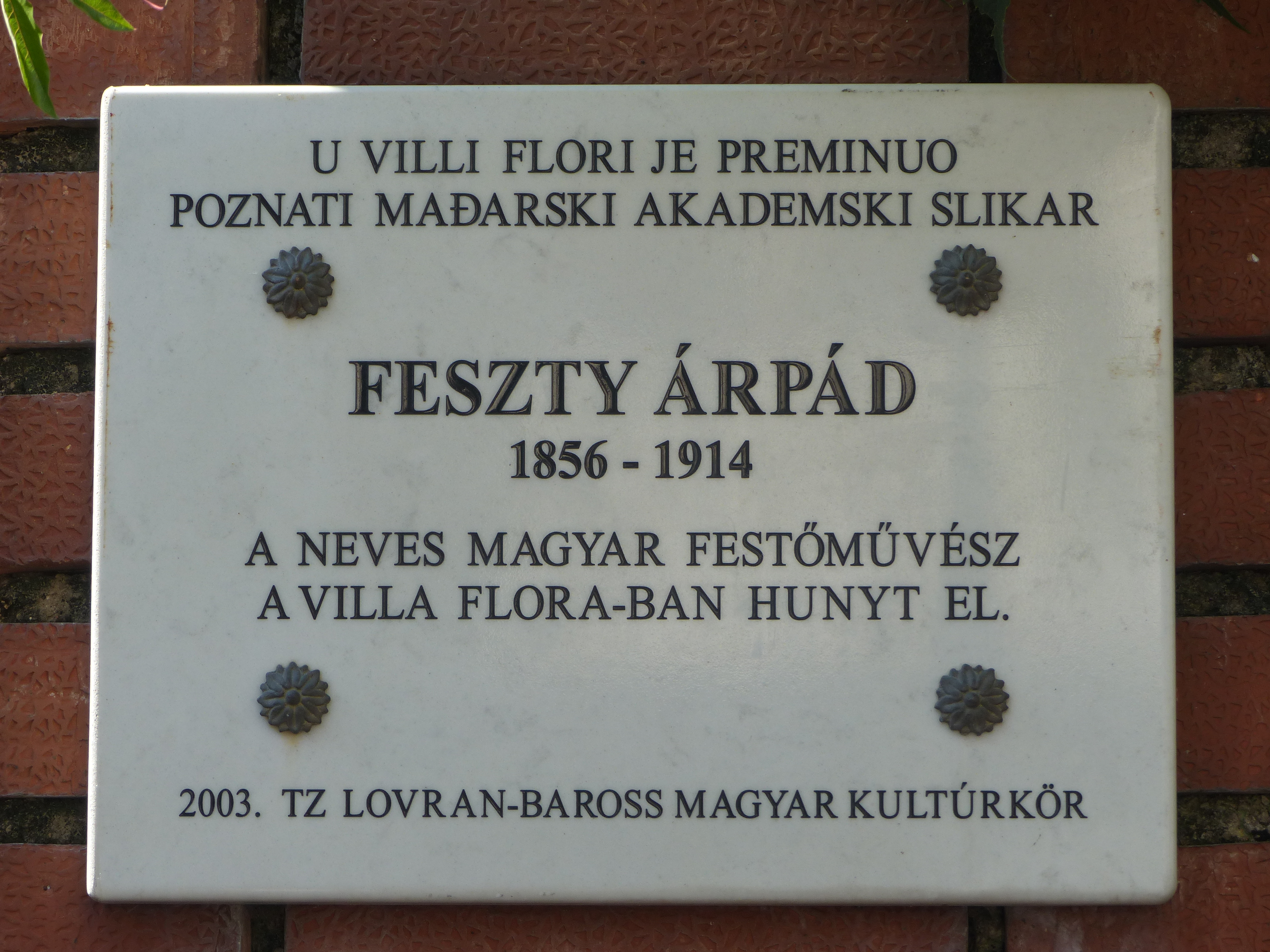 A felvétel 2016. junius 28-án készült Lovranban (Horvátország). Feszty Árpád emléktáblája a Villa Flóra bejáratánál. 2003. TZ Lovran-Baross Magyar Kultúrkör. U Villi Flori Je Preminuo Poznati Madarski Akademski Slikar